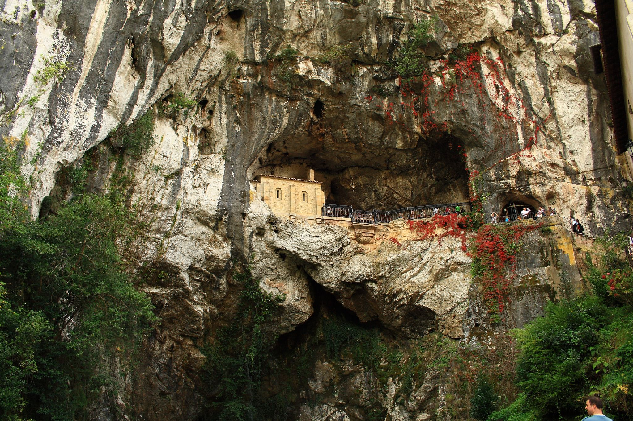 Otra vista de la Santa Cueva desde el mirador inferior